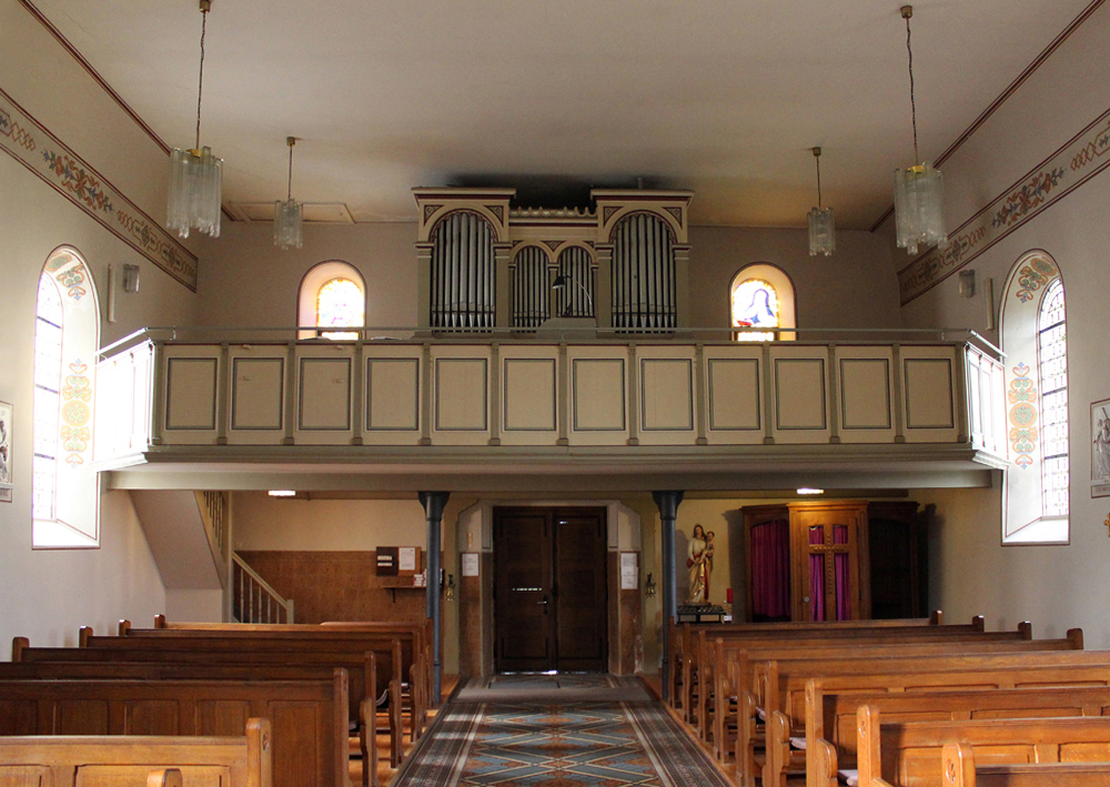 Blick ins Innere der katholischen Kirche St. Remigius in Leidingen, Gemeinde Wallerfangen, Landkreis Saarlouis, Saarland.